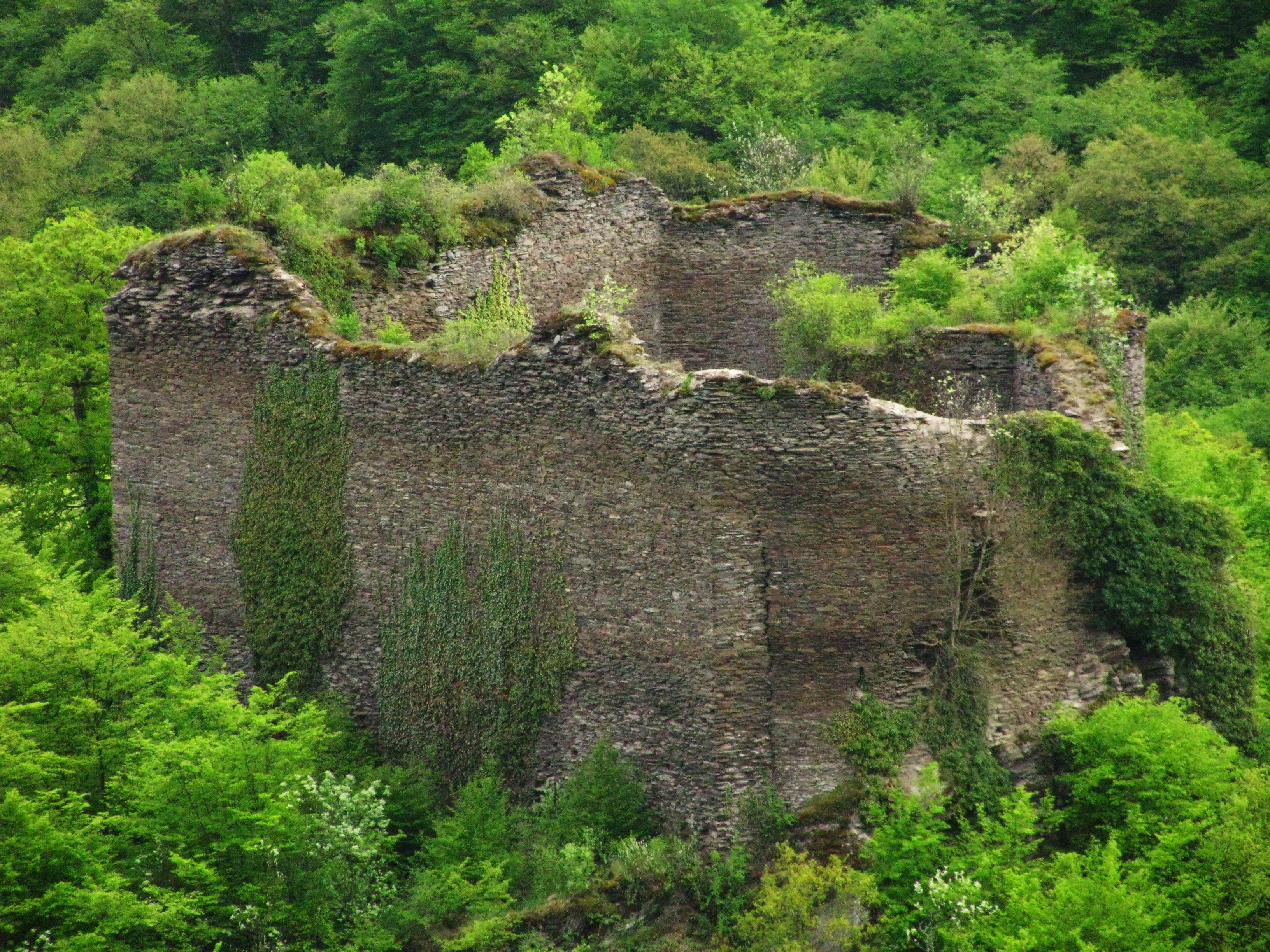 Rauschenburg